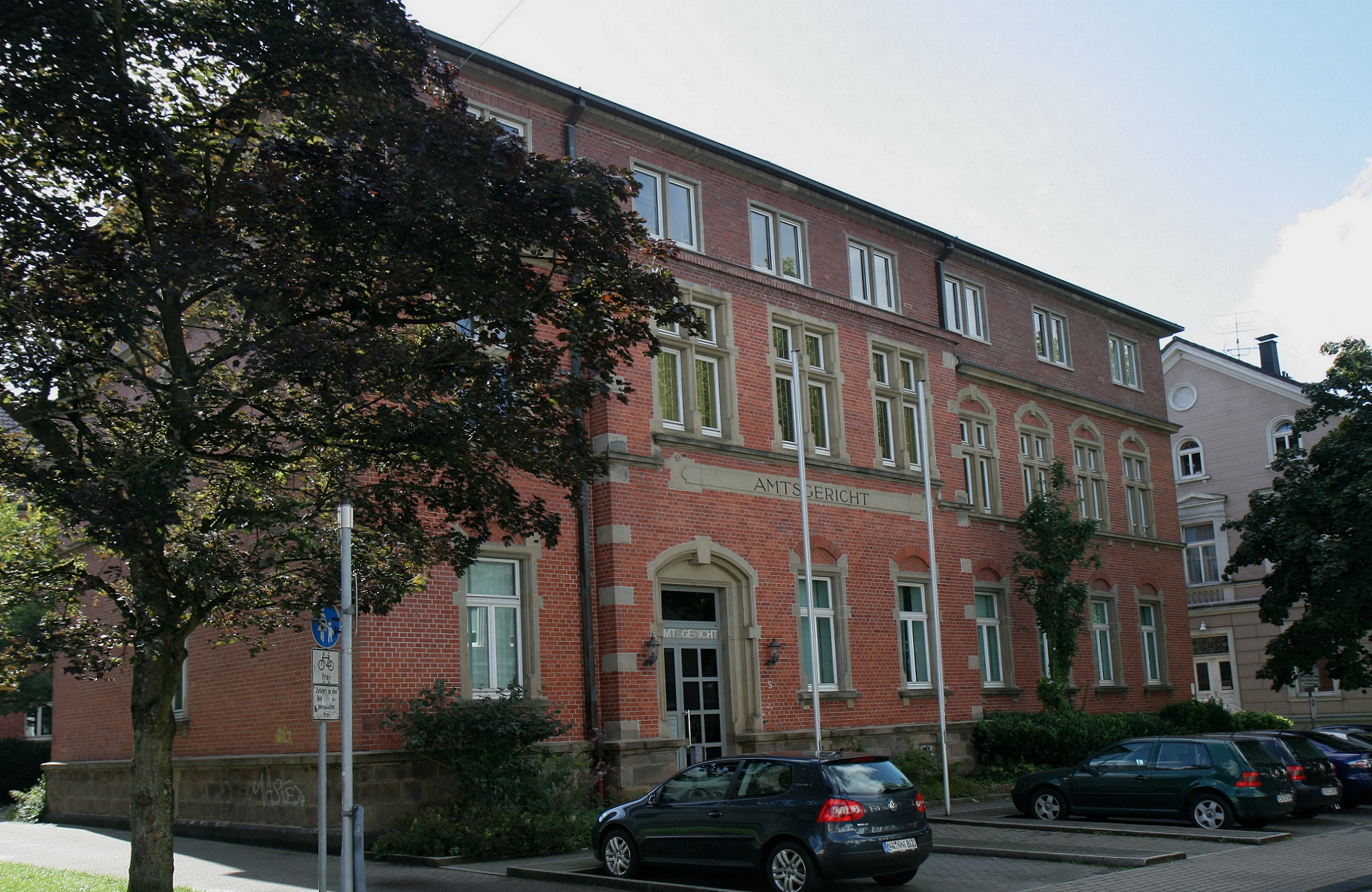 Amtsgericht Schwelm, Schulstraße 5 in Schwelm.